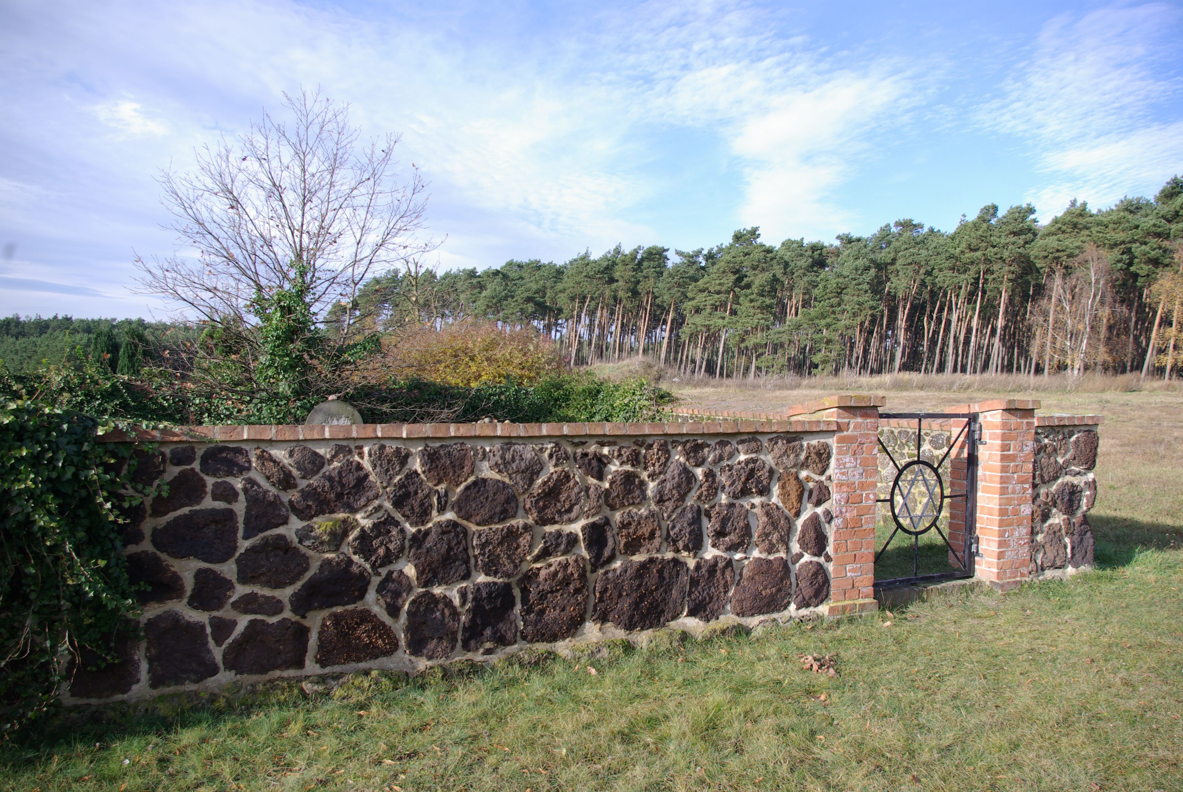 Niederer Fläming Ortsteil Meinsdorf in Brandenburg. Der jüdische Friedhof steht unter Denkmalschutz. Auf Ihn stehen 11 Grabsteine teilweise aus der Zeit um 1870.